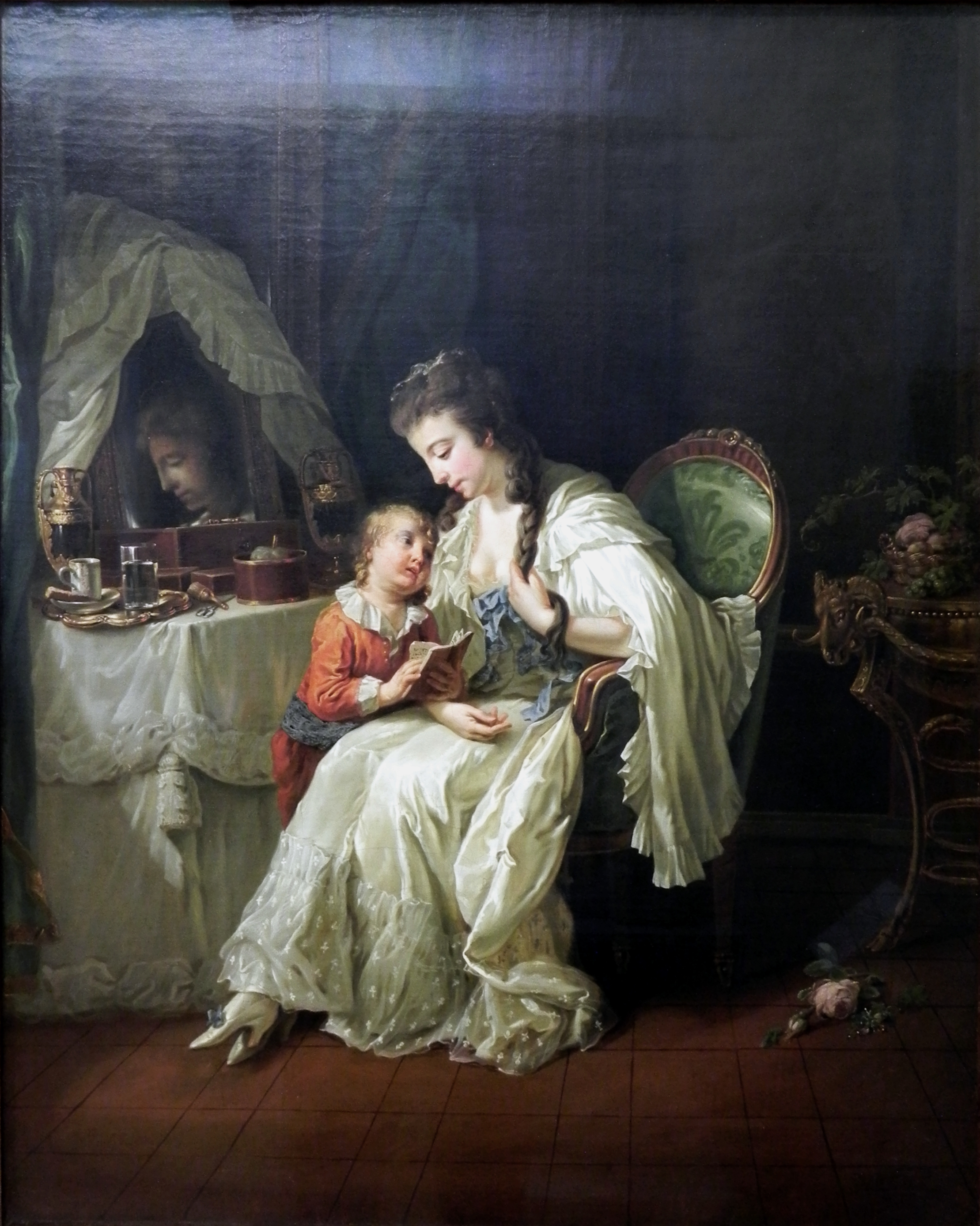 Familienszene